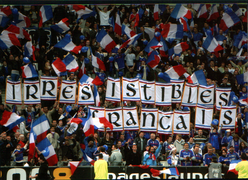 Tifo de l'association de supporters de l'Équipe de France de football, Irrésistibles Français.